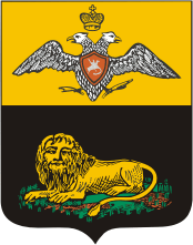 Coat of arms of the city of Bendery, PMR русский: Исторический герб города Бендеры, утверждённый русским императором Александром Первым (начало 19 века). Восстановлен как символ города в 1999 году.